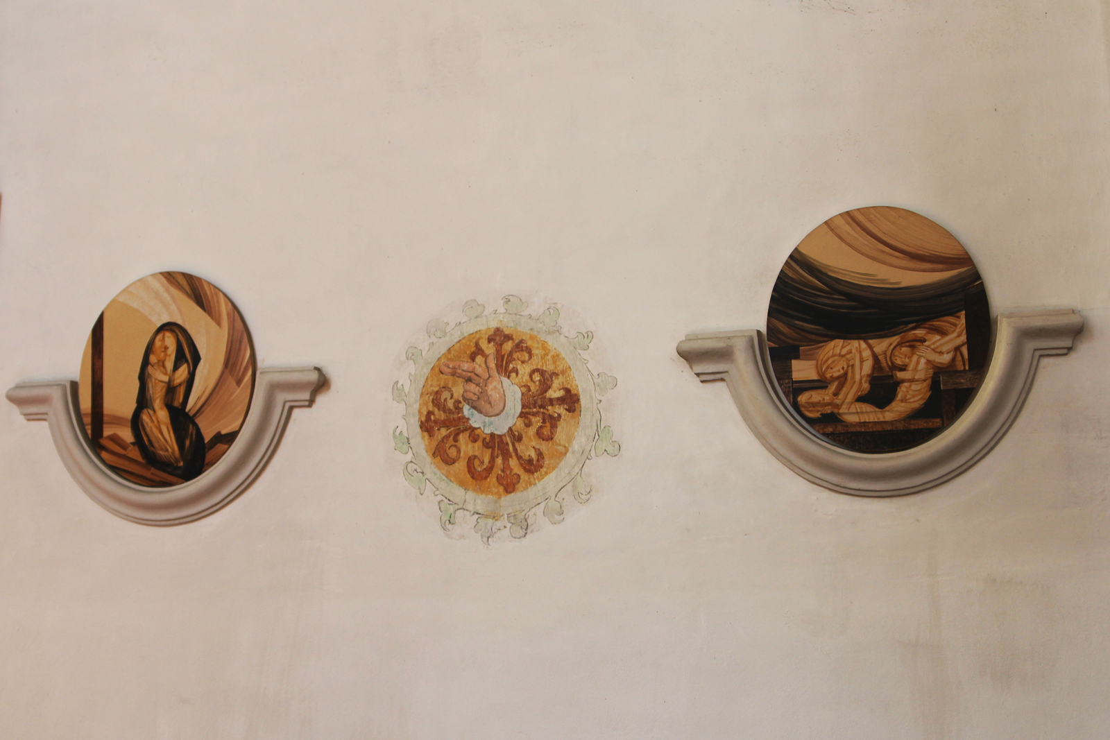 Kreuzweg und Apostelkreuz in der Pfarrkirche St. Laurentius Altheim, OÖ